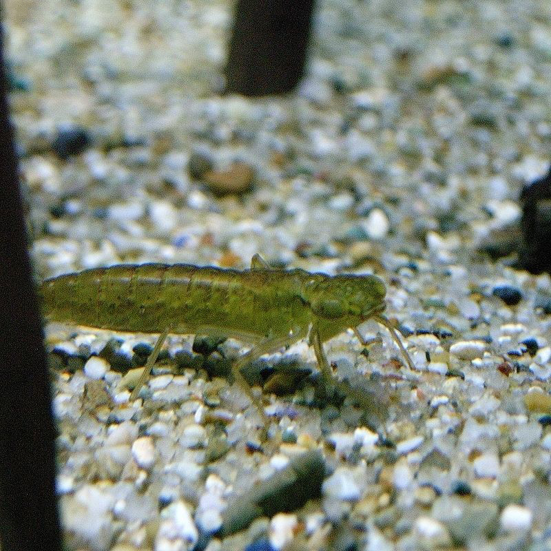 シオカラトンボのヤゴ（トンボ，Odonata）